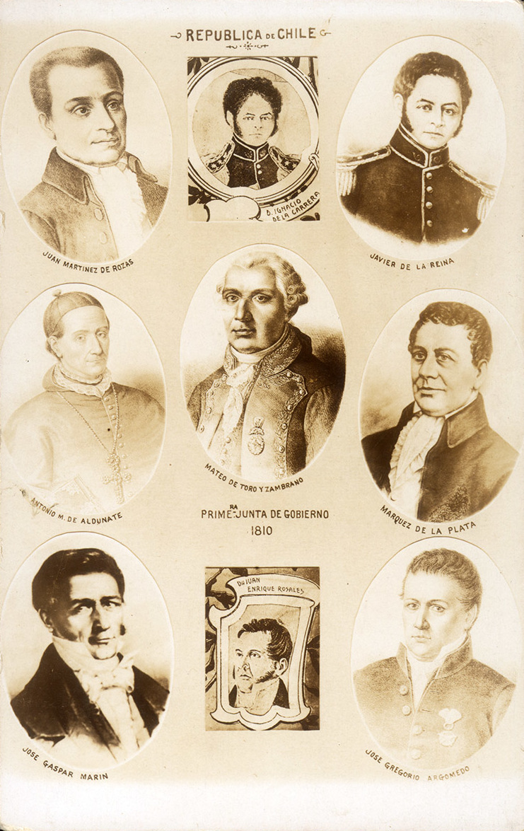 Retratos de los miembros de la Primera Junta de Gobierno de Chile (1810). Reproducción de dibujos de forma ovalada representando nueve hombres con titulo “Primera Junta de Gobierno (1810)”